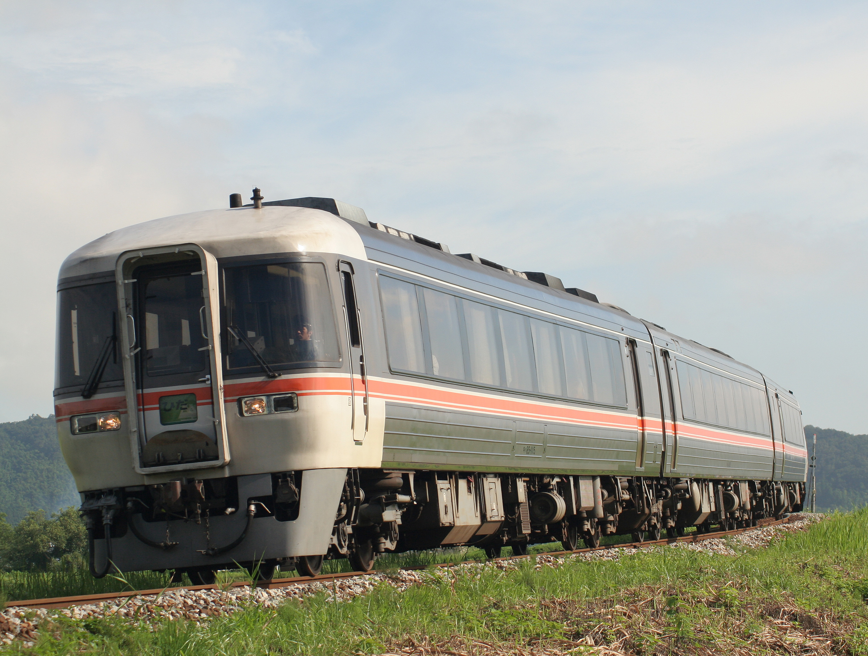 JR東海キハ85系気動車 特急ワイドビューひだ6号 高山本線、西富山 - 婦中鵜坂 1026D